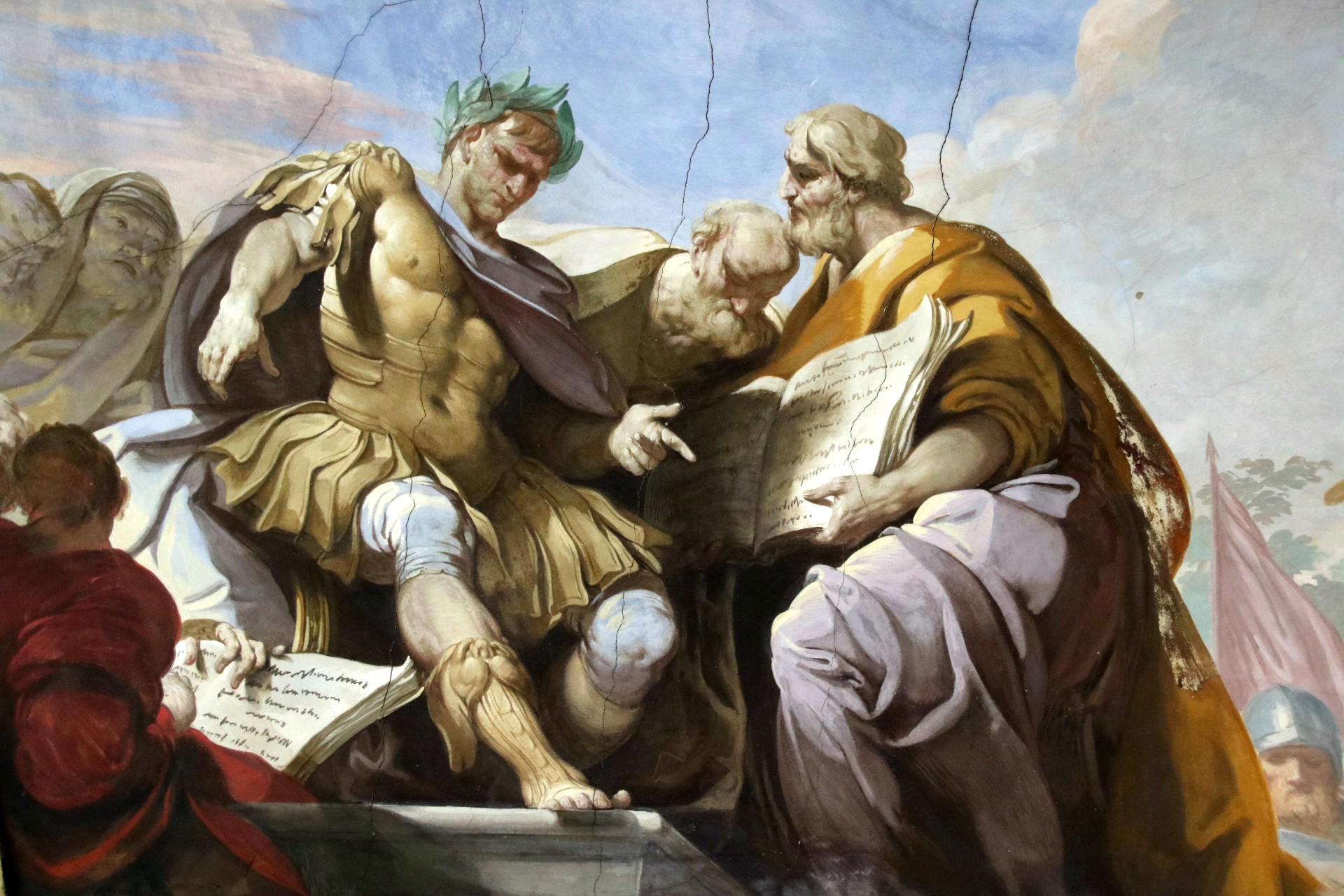 Salone, Palazzo Quaratesi (Pisa)